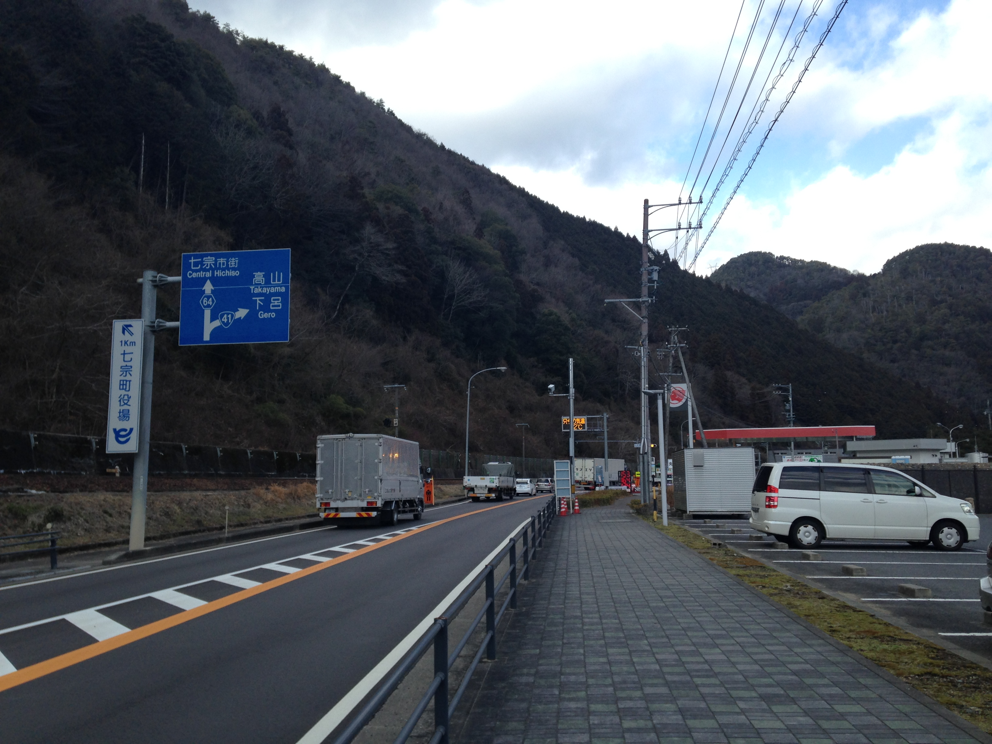 七宗橋付近の国道41号